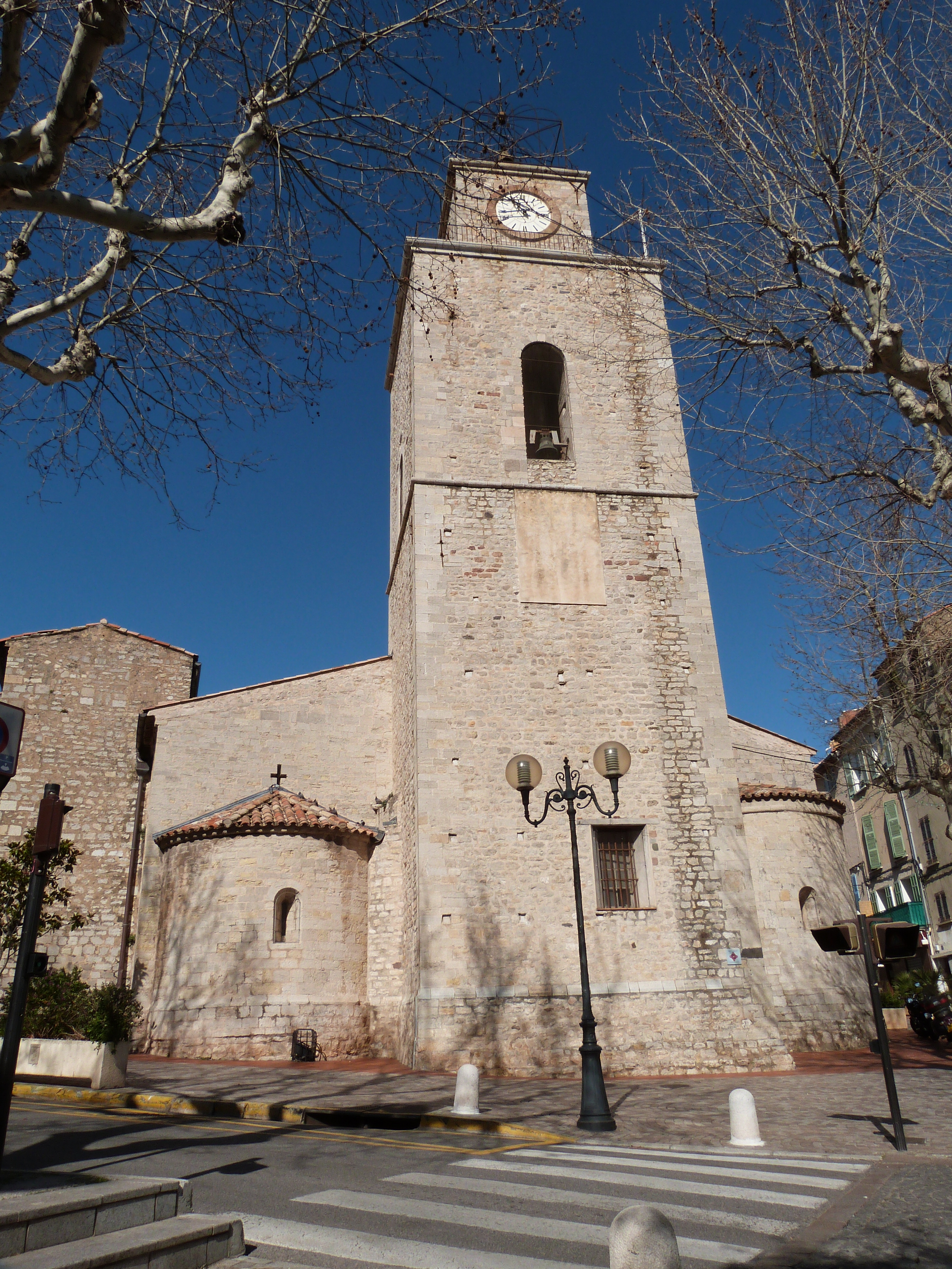 Église Saint-Laurent d'Ollioules (Classé) .